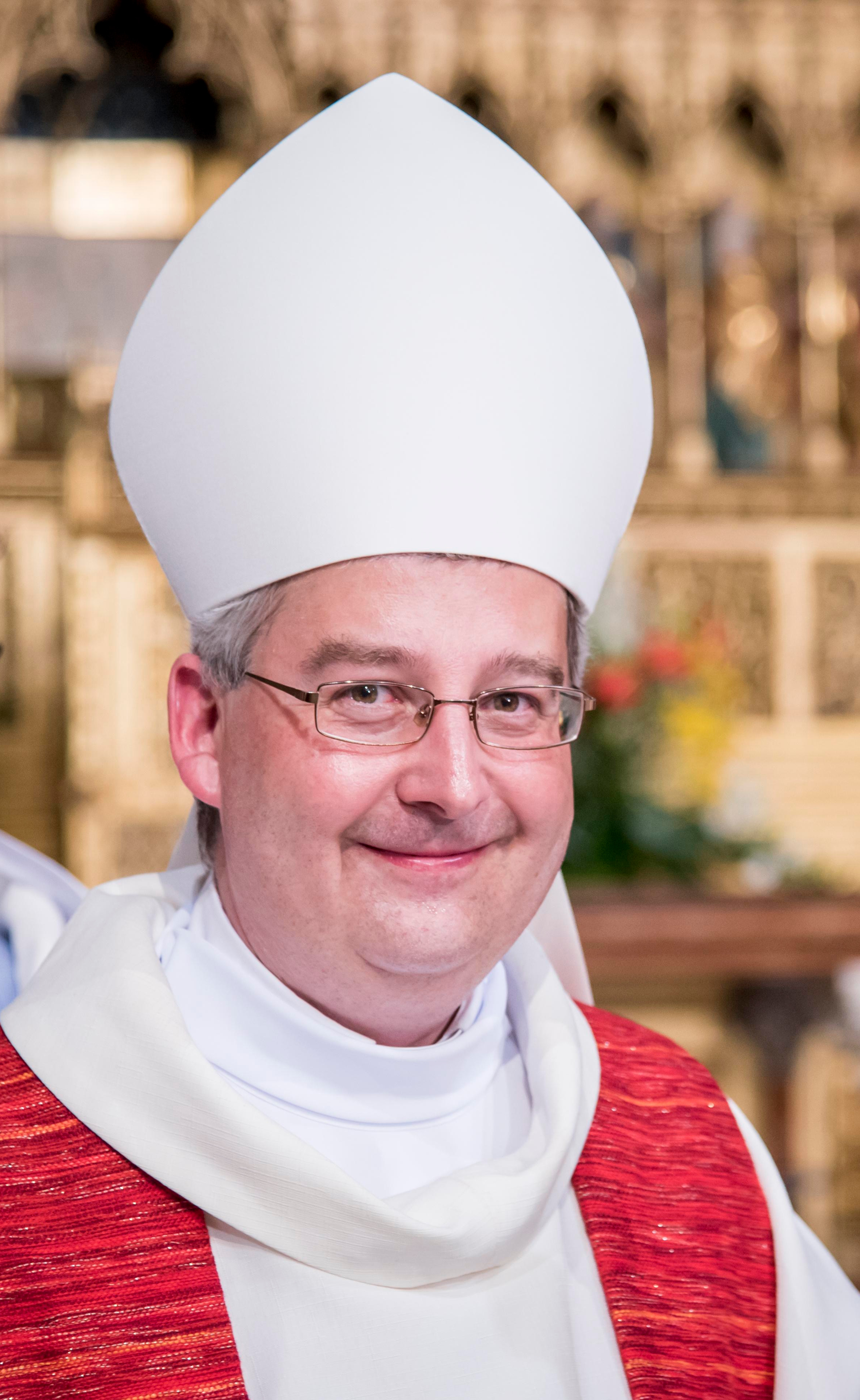 Výřez z fotografie z biskupského svěcení Pavla Konzbula v Brně 29. června 2016. Autor původní fotografie: Vít Kobza